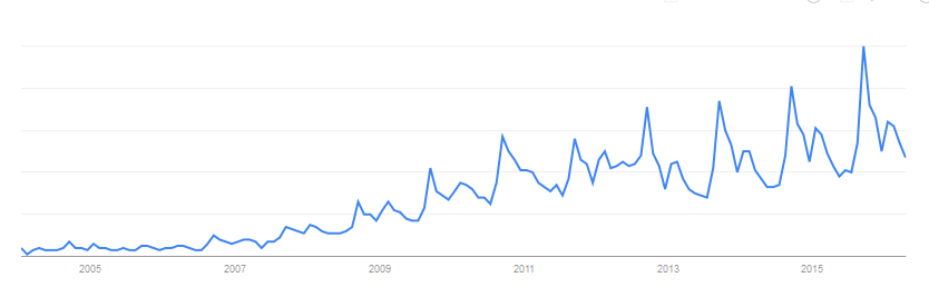 Популярність пошукових запитів, пов'язаних з репетиторськими послугами у пошукових системах